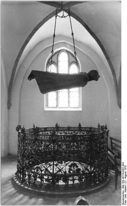 Güstrow, Dom Zentralbild Link 27.8.1970 Barlachs "Schwebender Engel" im Dom zu Güstrow Diese Figur war 1937 von den Nationalsozalisten aus dem Dom entfernt und verschrottet worden. Nach 1945 wurde sie neu gegossen und erhielt ihren alten Platz in Güstrow. Wie diese Plastik wurden 381 Werke Barlachs von den Faschisten beschlagnahmt und als "entartete Kunst" diffamiert.